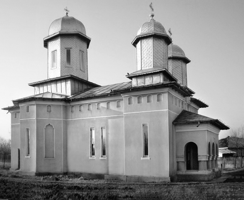 Biserica din satul Constantin Gabrielescu, comuna Bordei Verde